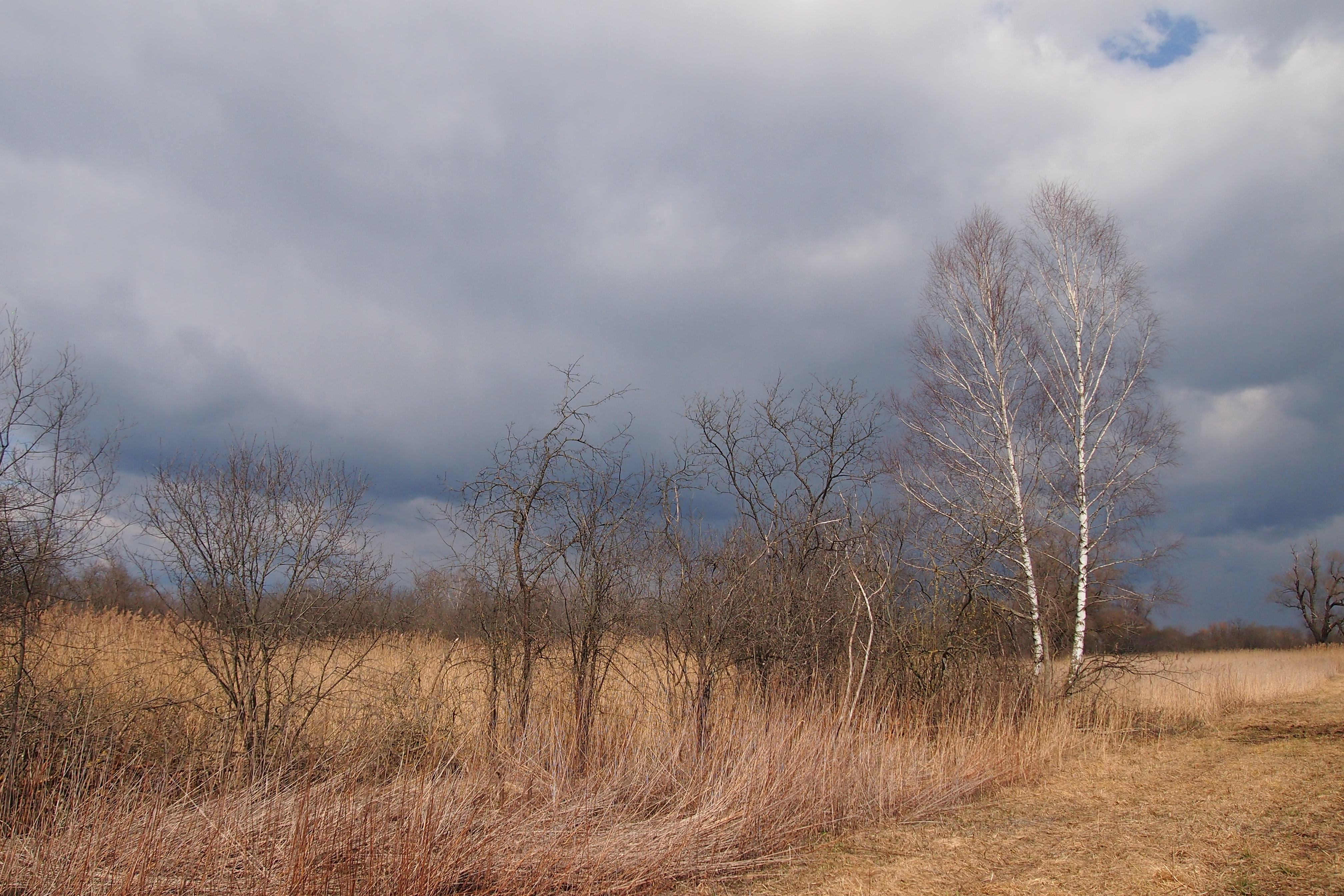 Blick über die Mertinger Höll' ("Mertinger Hölle") im Frühling.